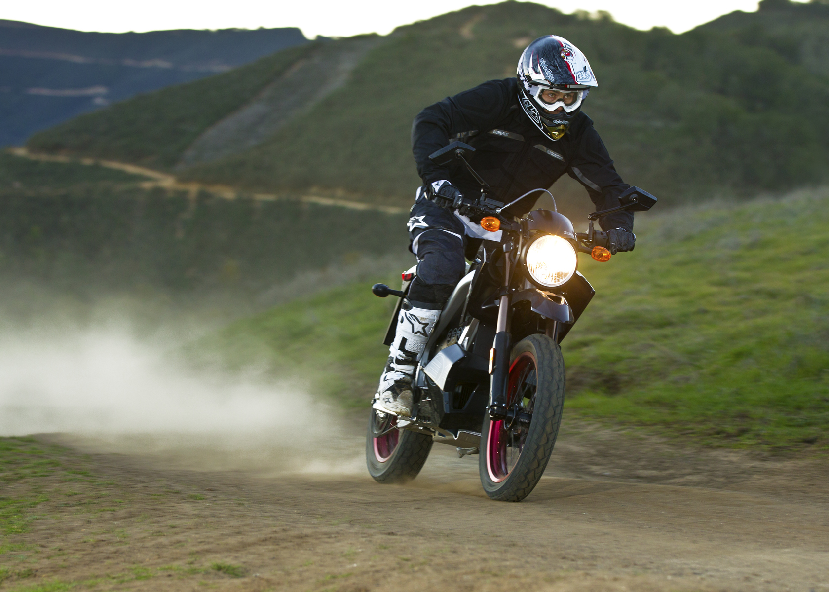 Zero DS 2011 in Aktion